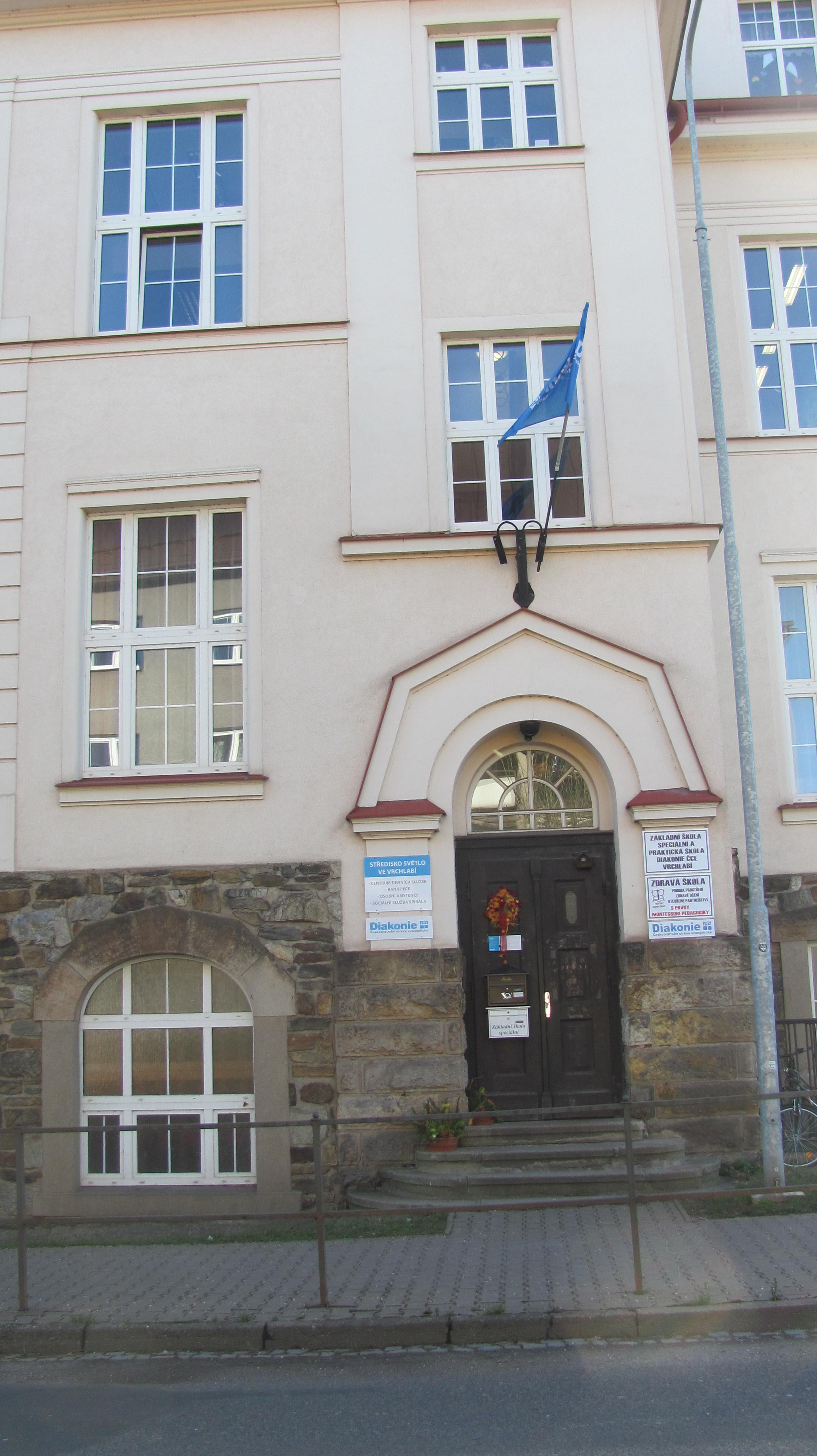 Budova střediska Světlo